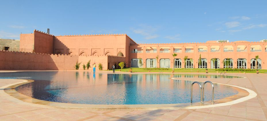 Hotel_Ryad_Mogado_Agdal_Marrakch_4.JPG MAROC